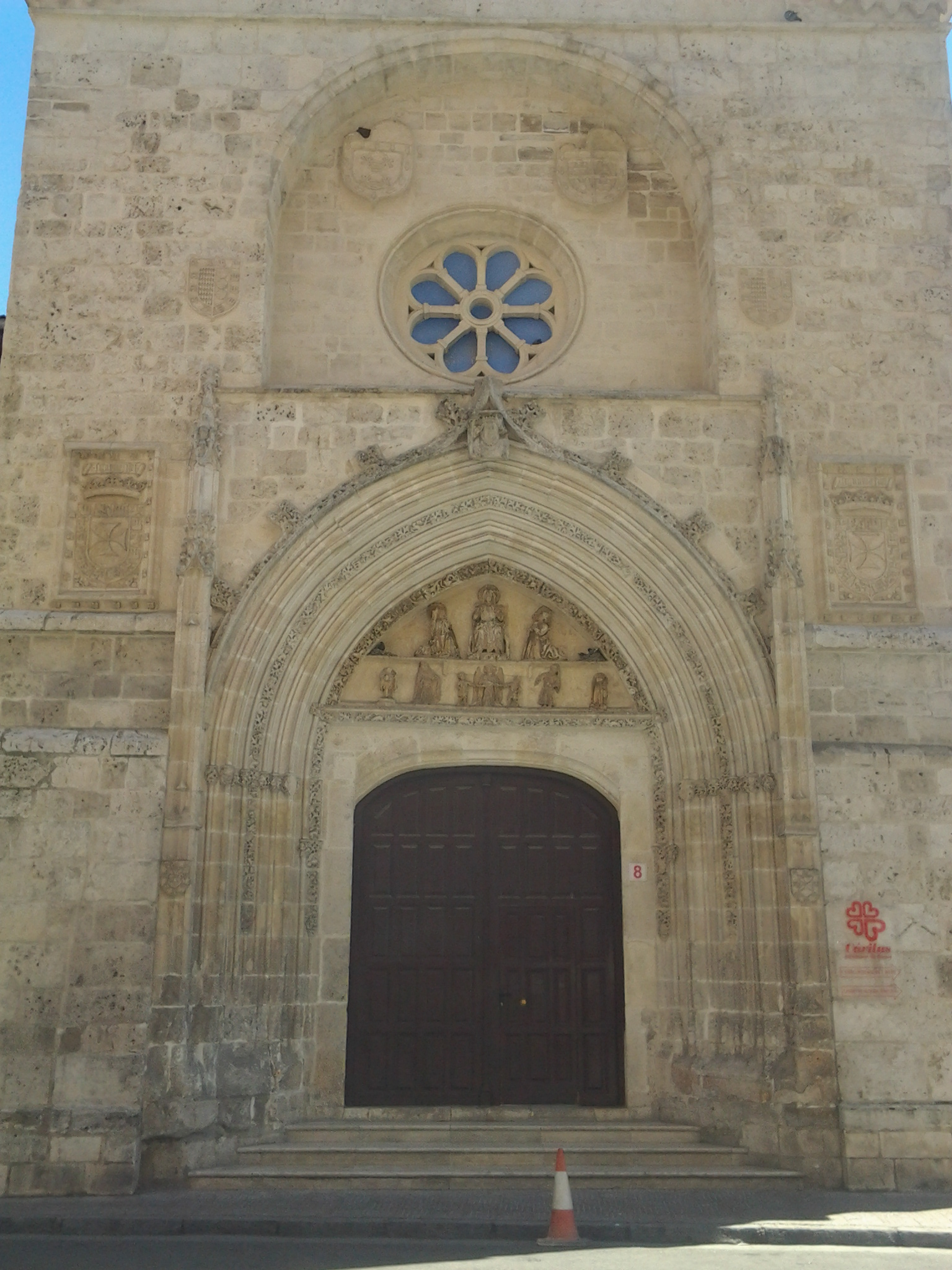 Portada de la capilla de San Ildefonso del desaparecido convento de la Stma. Trinidad de Burgos. En la actualidad alberga las sedes de Cáritas Diocesana y Patrimonio Artístico de la ciudad de Burgos. Provincia de Burgos, (España).